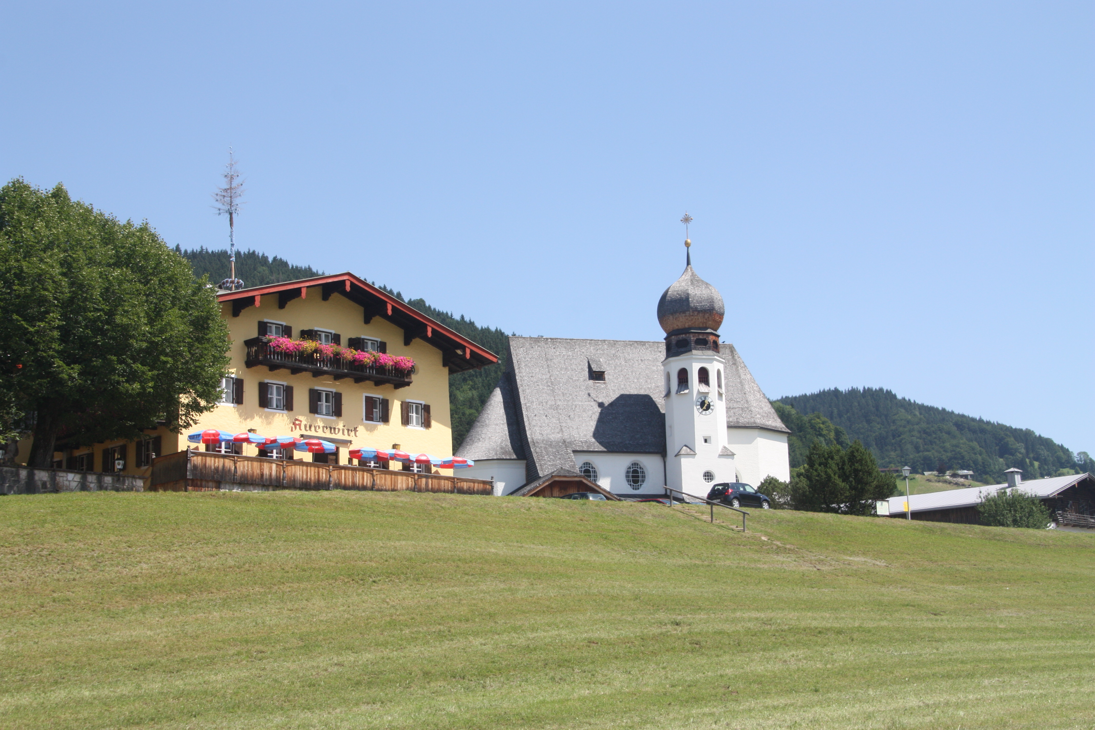 OT Unterau